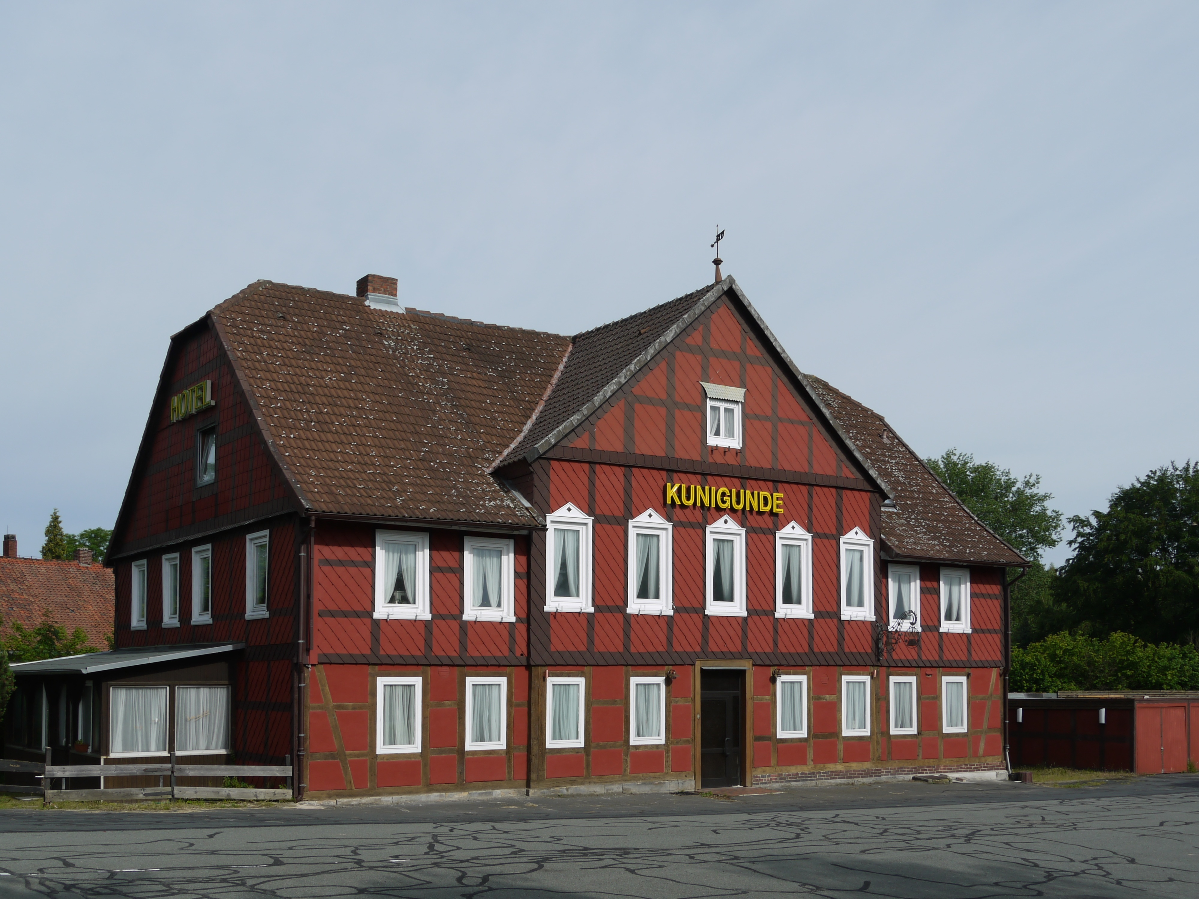 Ehemaliges Gasthaus in Kunigunde bei Liebenburg an der Bundesstraße 6, erbaut 1826